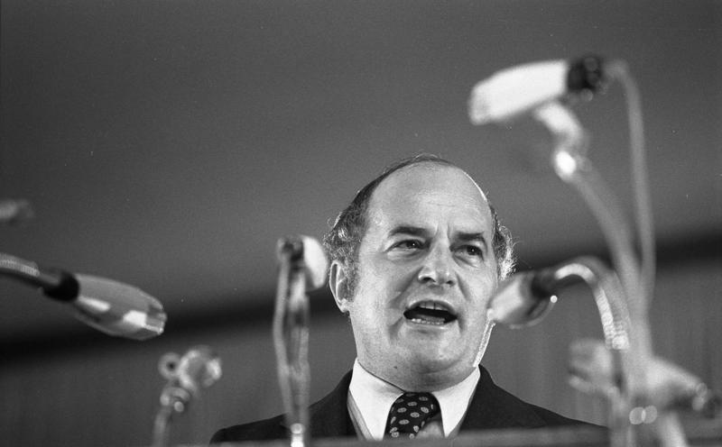 Großkundgebung der CDU zur Bundestagswahl in Köln, Messehalle